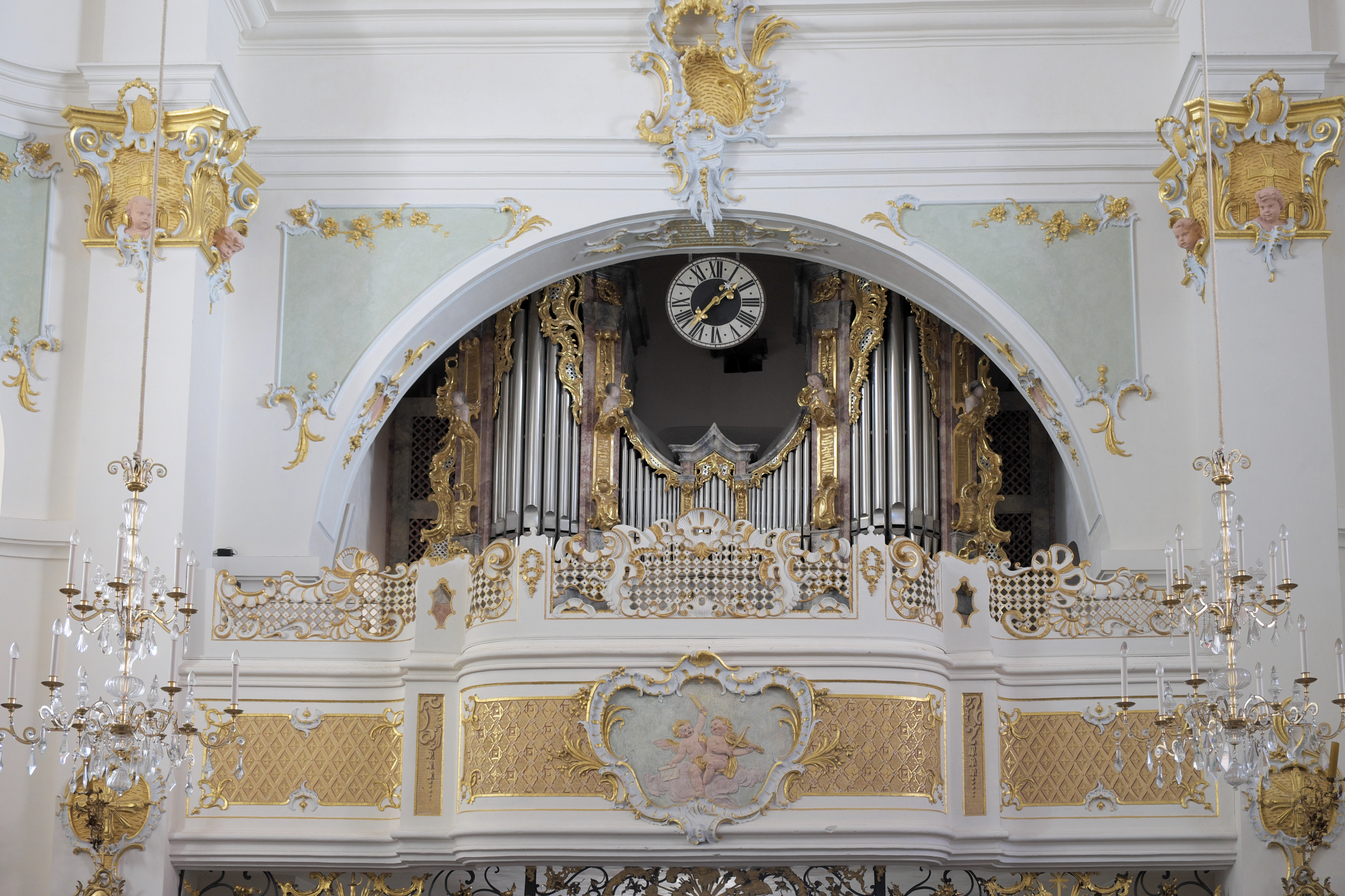 Katholische Pfarr- und Klosterkirche St. Alto und St. Birgitta in Altomünster im Landkreis Dachau (Bayern), Orgelempore